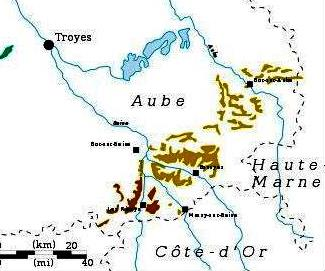 Carte de la côte des Bar (Aube, France)